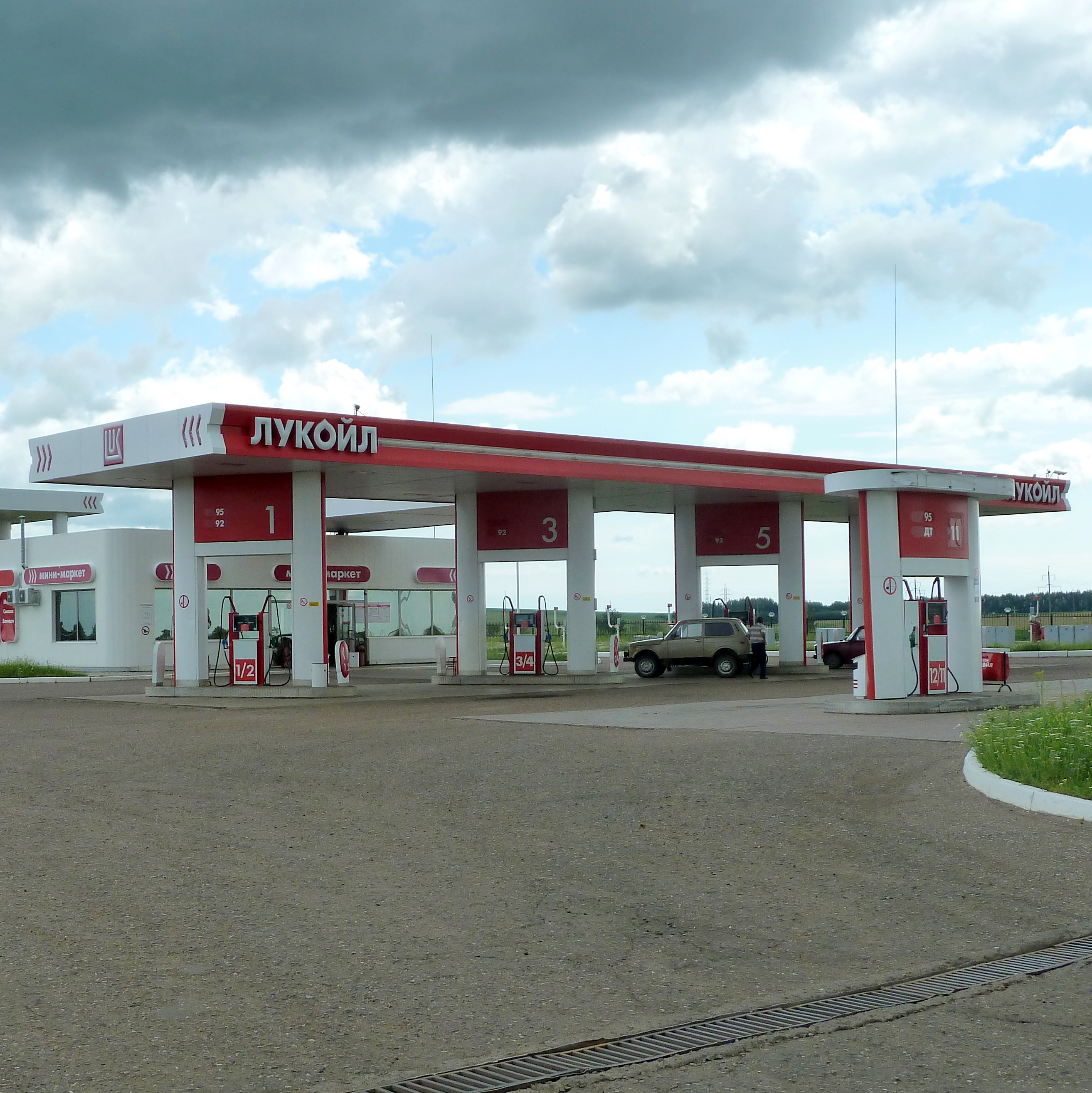 Заправка. Куединский район, Пермский край